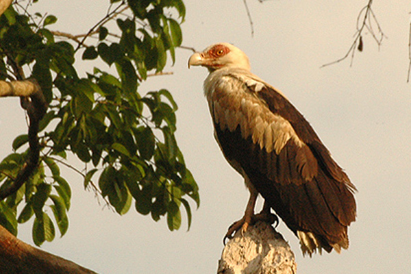 Uganda Palm-nut Vulture Gypohierax angolensis